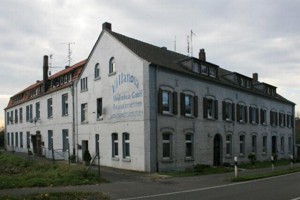 Denkmal Nr. 54 in Schwalmtal-Hostert